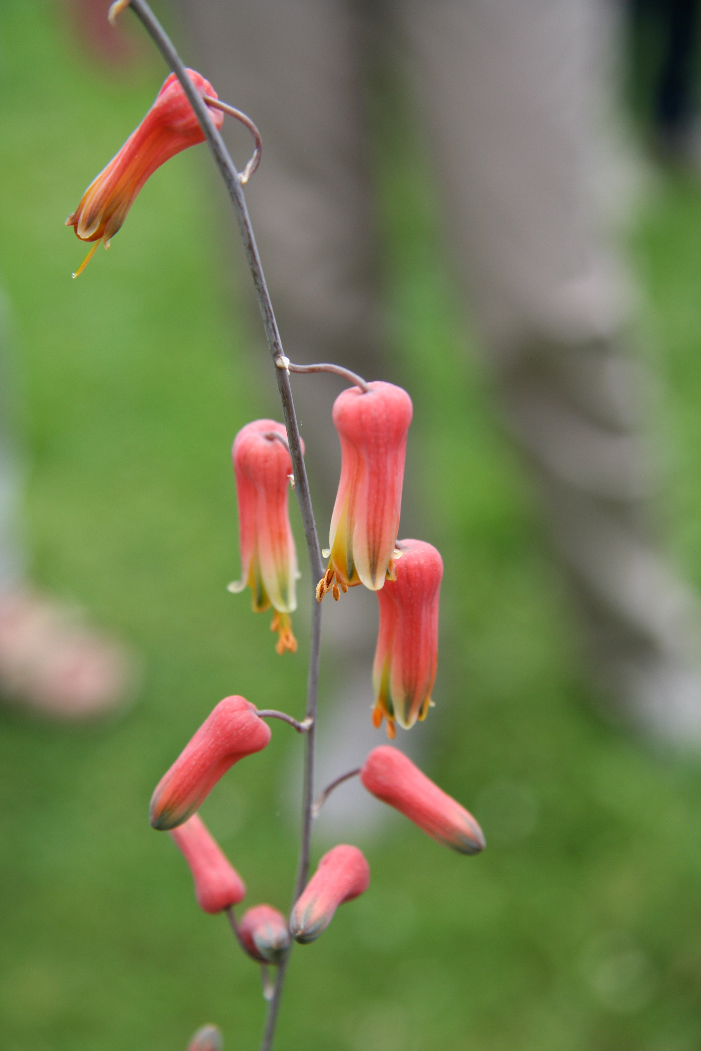 Aloe tewoldei im Botanischen Garten Bochum